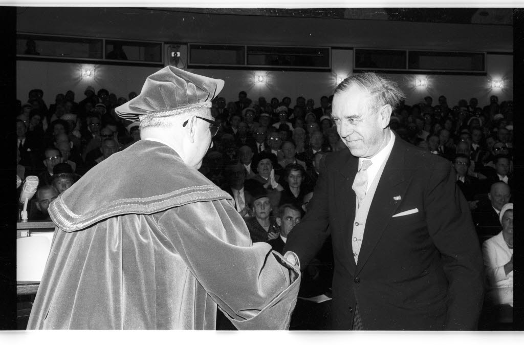 Erster Festakt in der Konzerthalle am Schloss. Verleihung der Ehrenbürgerschaft an Konsul Thomas Entz- von Zerssen (rechts) für seine Verdienste zur Förderung von Wissenschaft und Kultur als Vorstandsmitglied und Präsident der Schleswig-Holsteinischen Universitätsgesellschaft durch CAU-Rektor Prof. Dr. Wolfgang Bargmann (links).